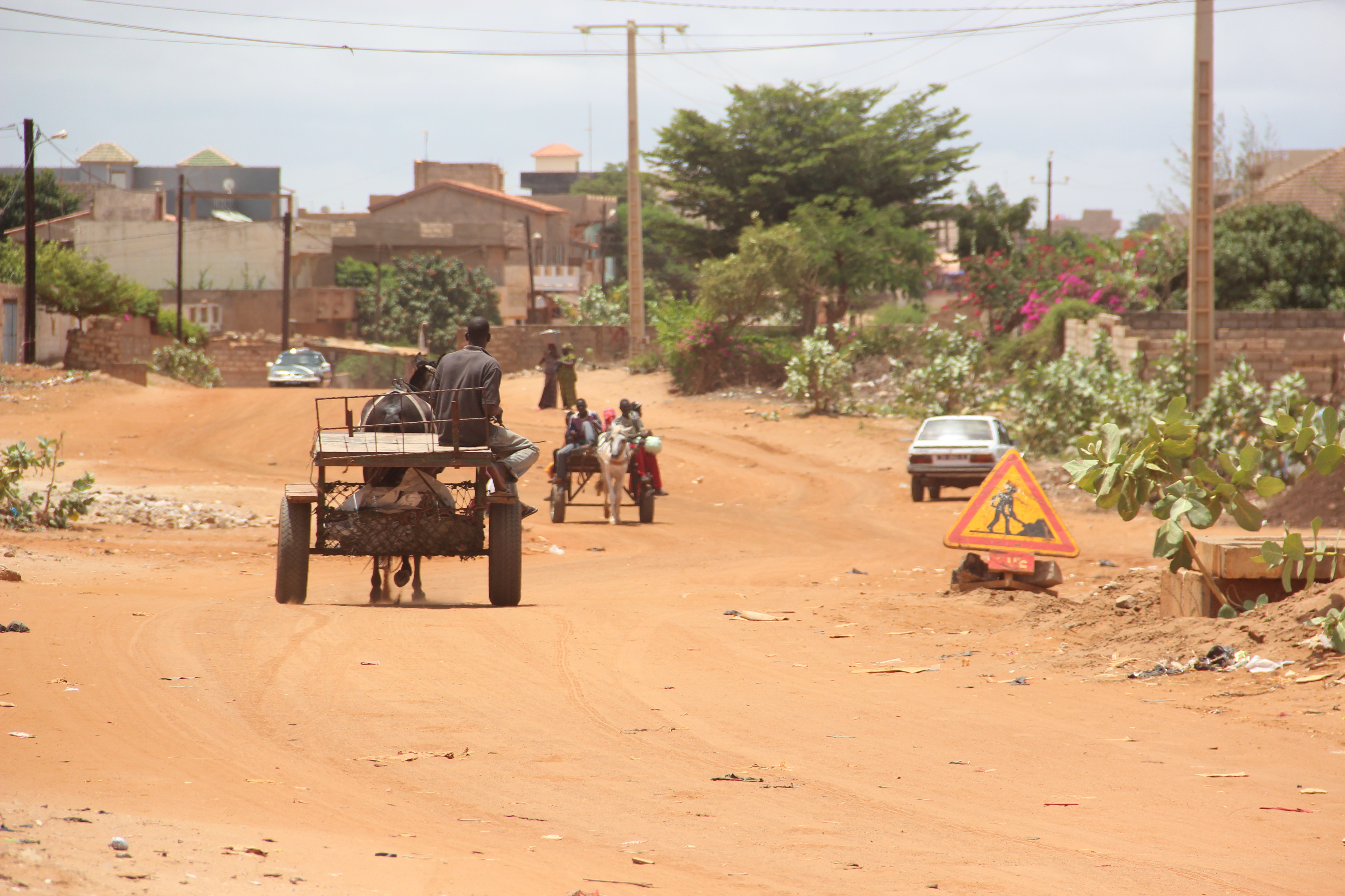 Charrette à Saly-Portudal, Sénégal. This is an image with the theme "Africa on the Move or Transport" from: Senegal